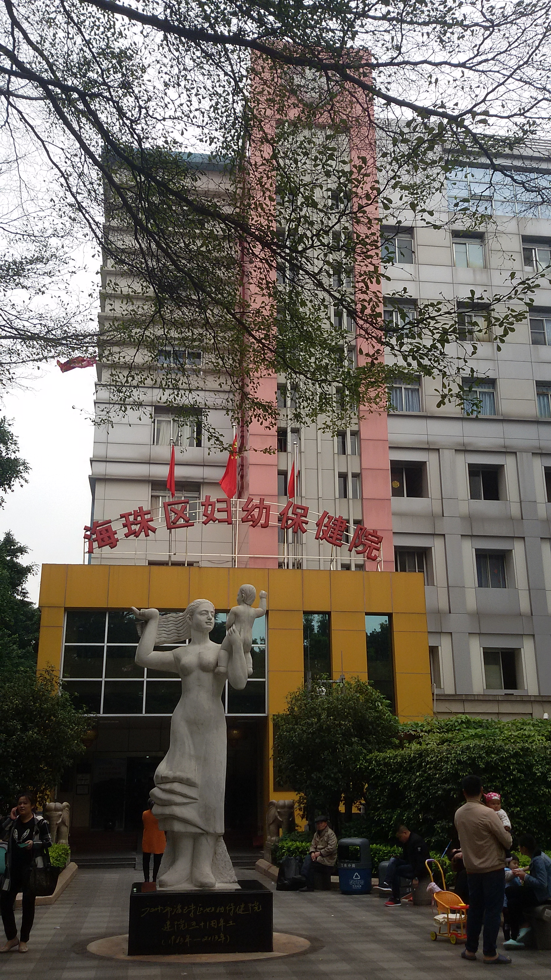 粵語: 海珠區婦幼保健院